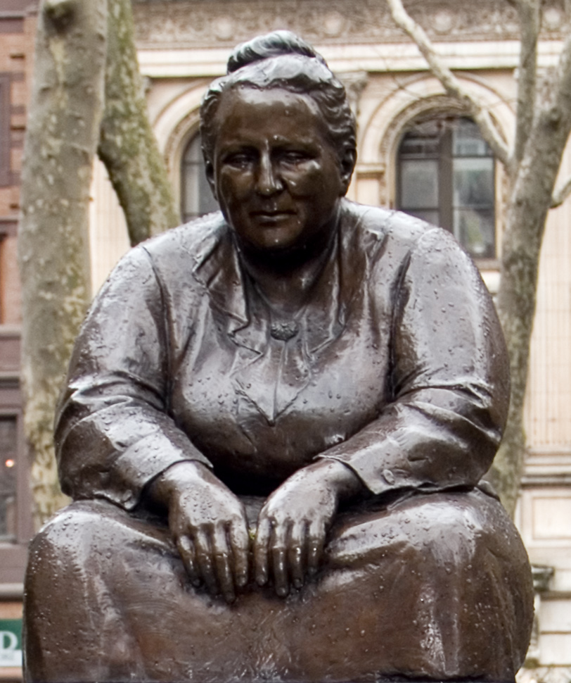 Gertrude Stein Statue im Bryant-Park hinter der Public Library New York